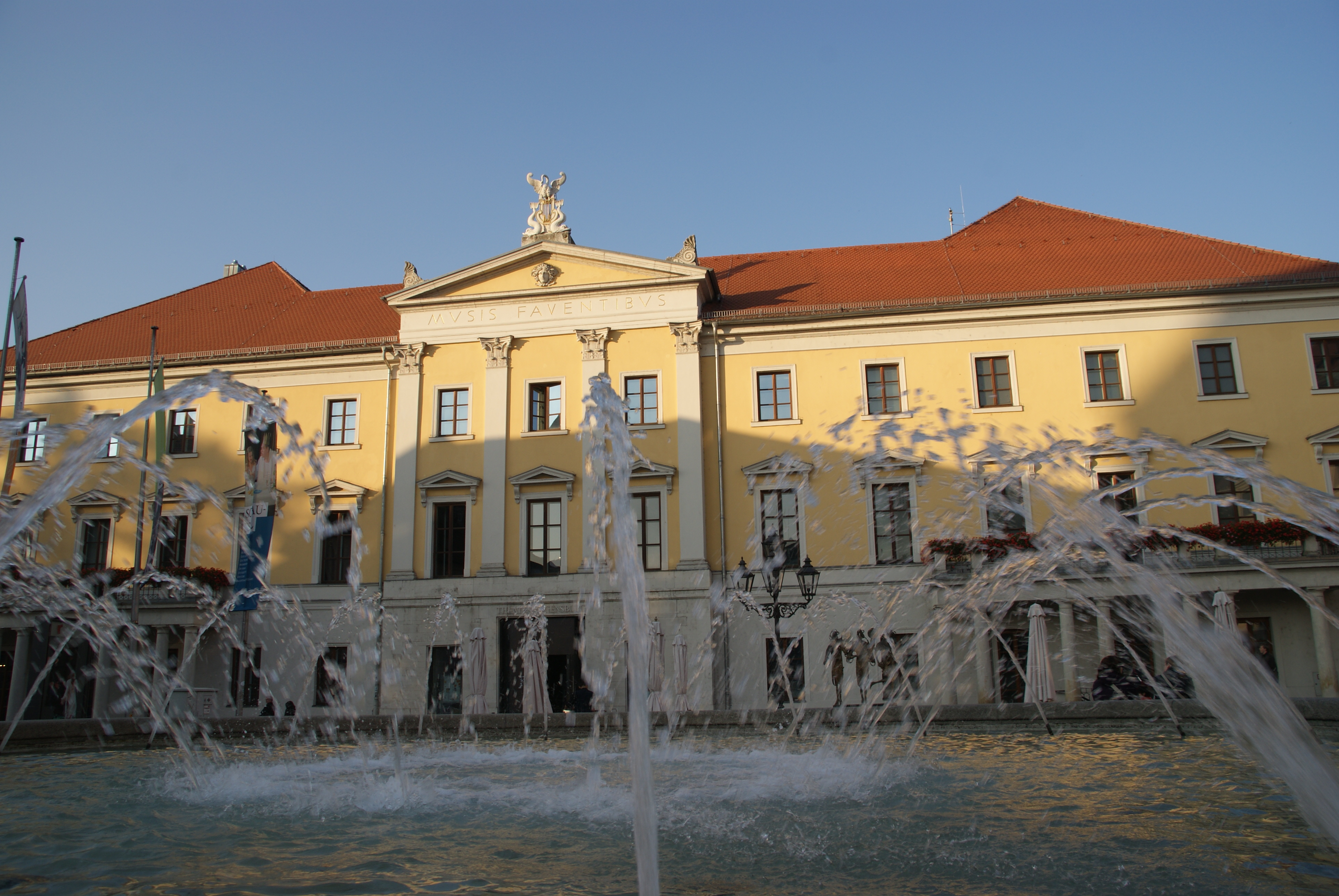 Stadttheater am Bismarckplatz , 1804 von Emmanuel d'Herigoyen erbaut